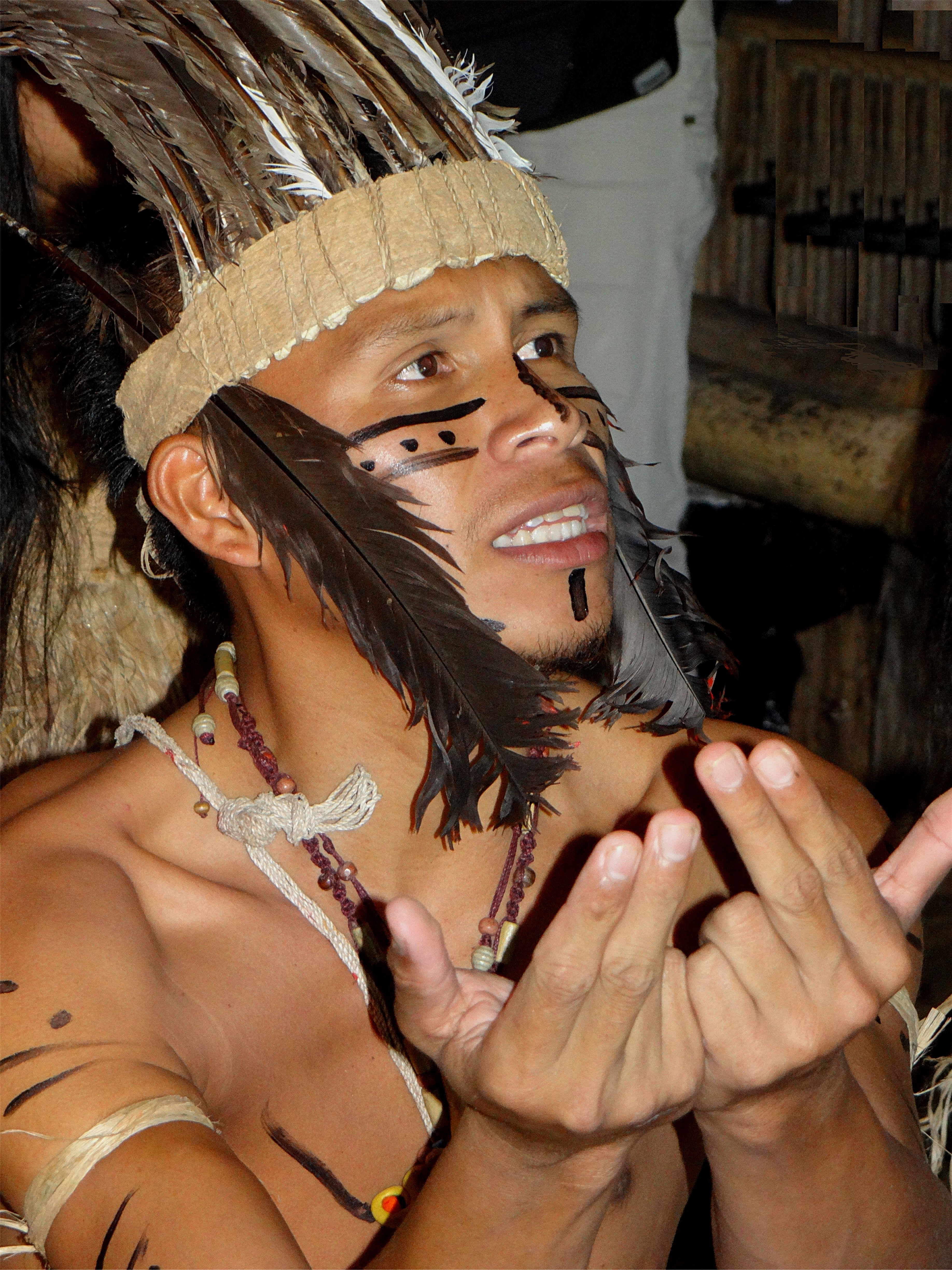 Cérémonie "Dieu, nature et homme", Palenque Tonjibe (village), région de Guatuso, Costa Rica.